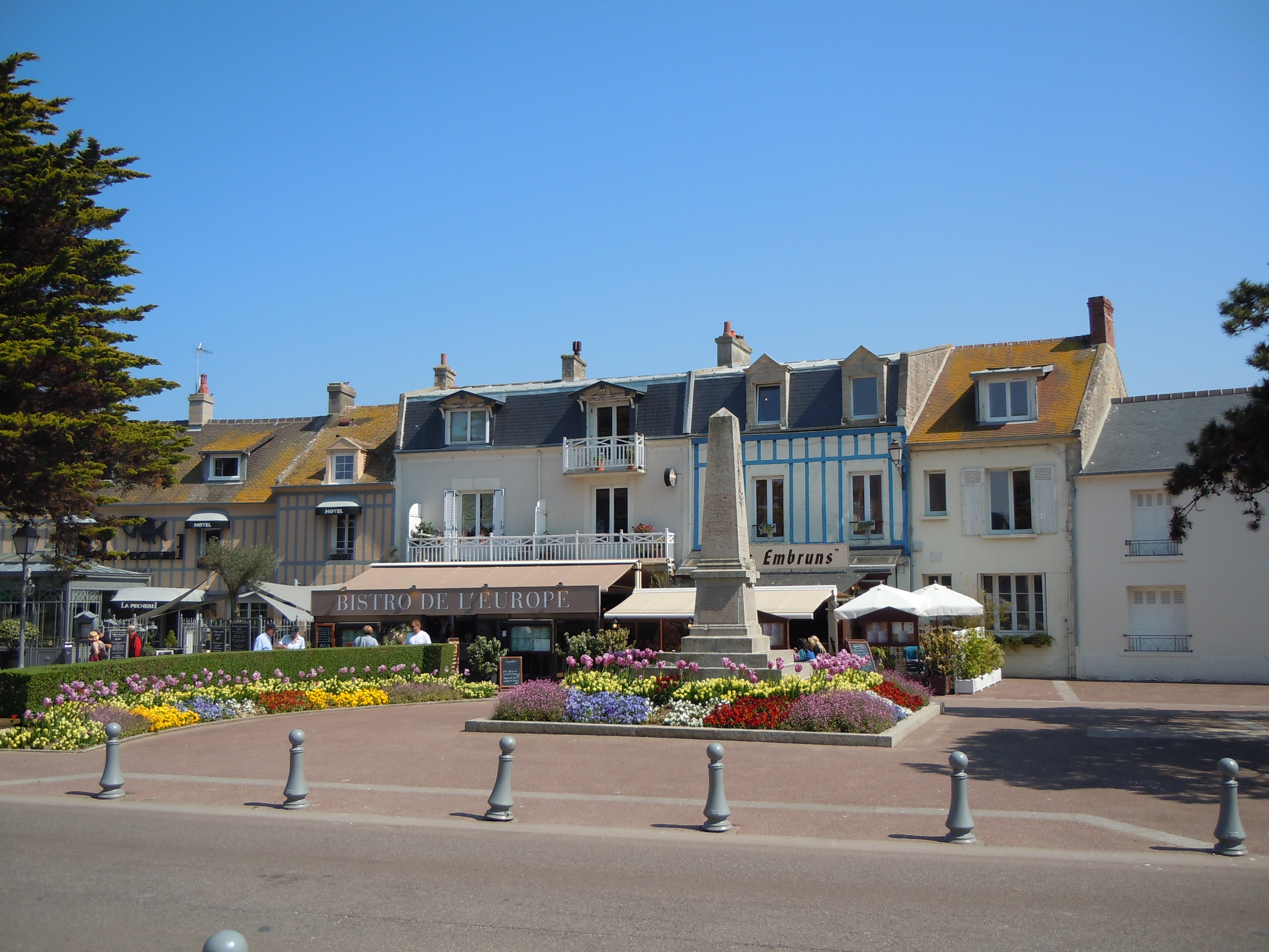 Courseulles-sur-Mer - monument aux morts - Calvados - Basse-Normandie